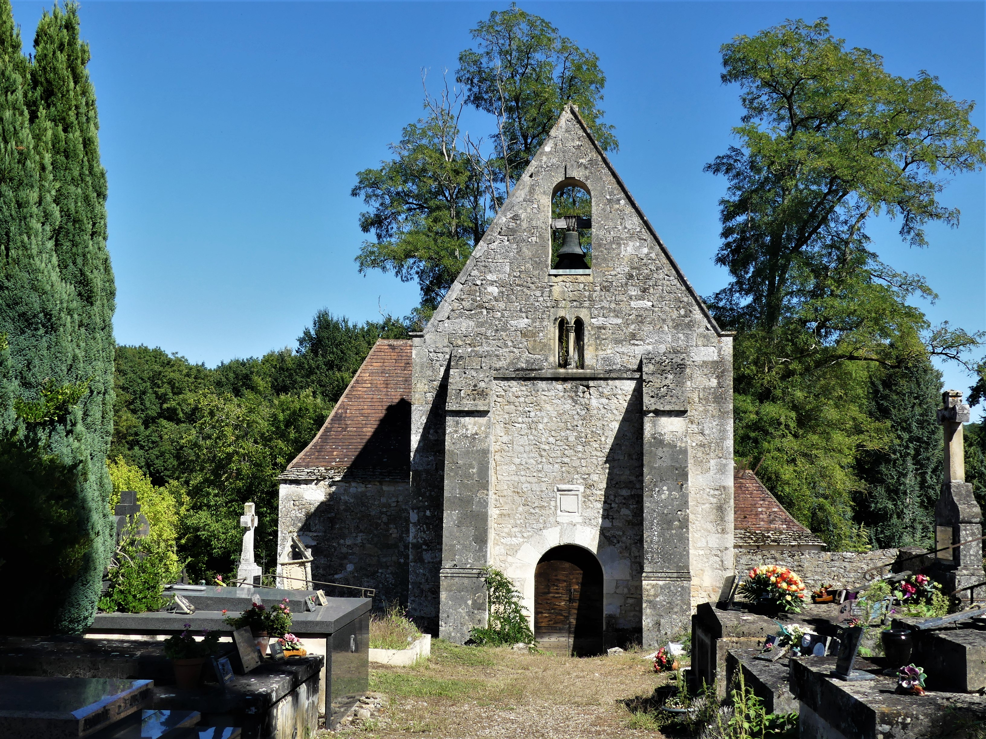 L'église de Fayrac, Castelnaud-la-Chapelle, Dordogne, France.